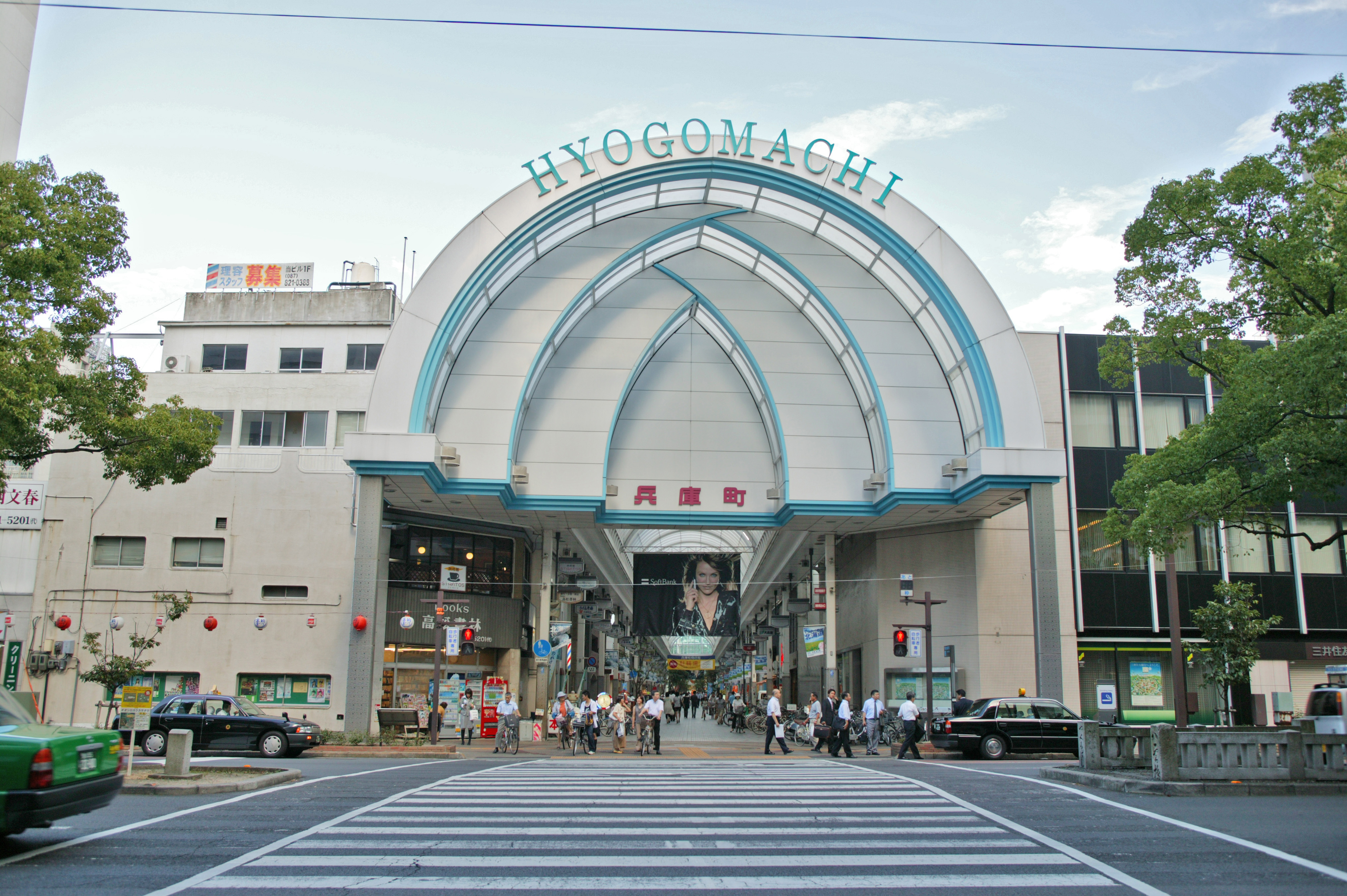 Hyogo-Machi, Takamatsu City.